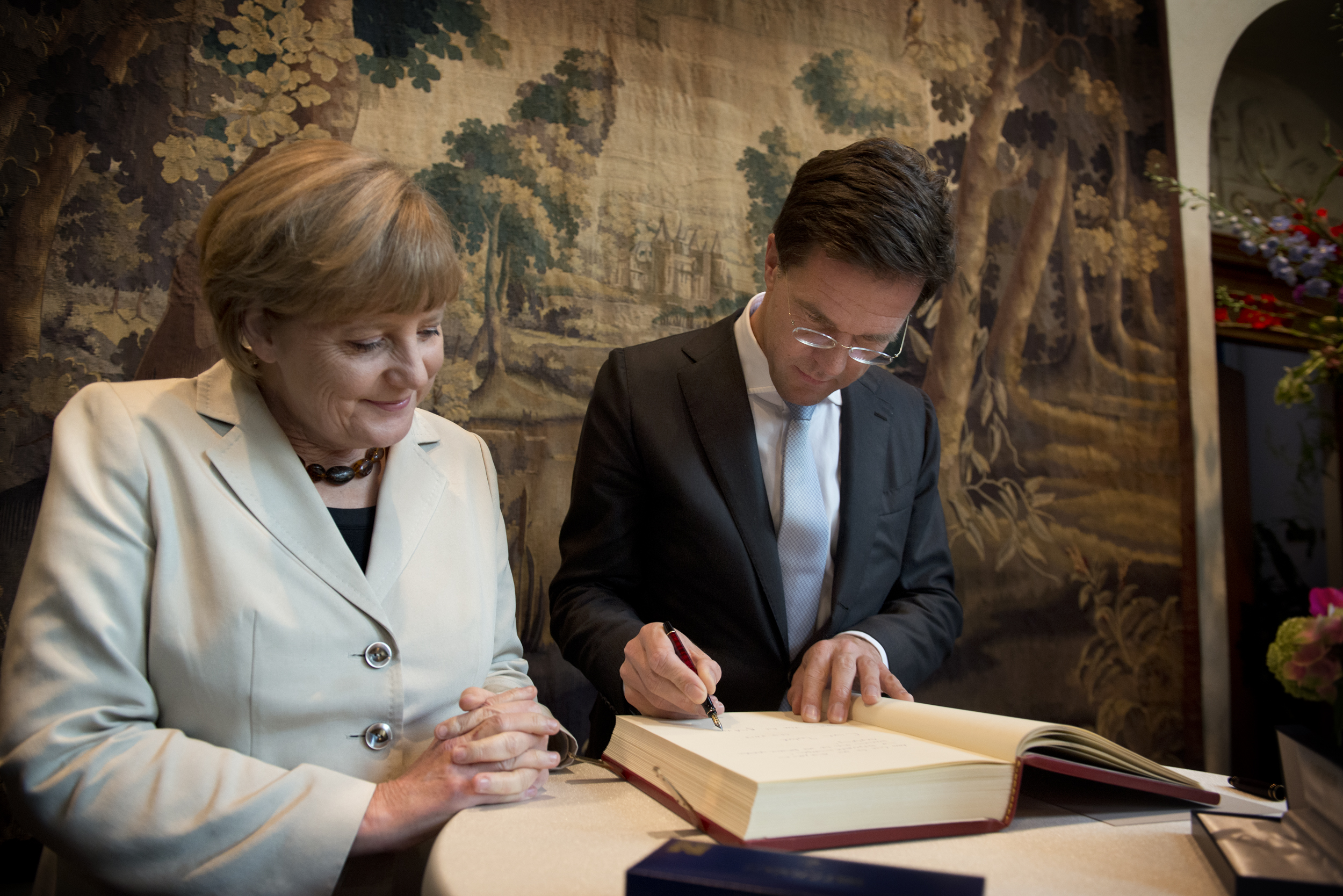 Minister-president Rutte tekent het gastenboek onder toeziend oog van bondskanselier Merkel voorafgaand aan een gezamenlijk ministersoverleg tussen de Nederlandse en de Duitse regering.